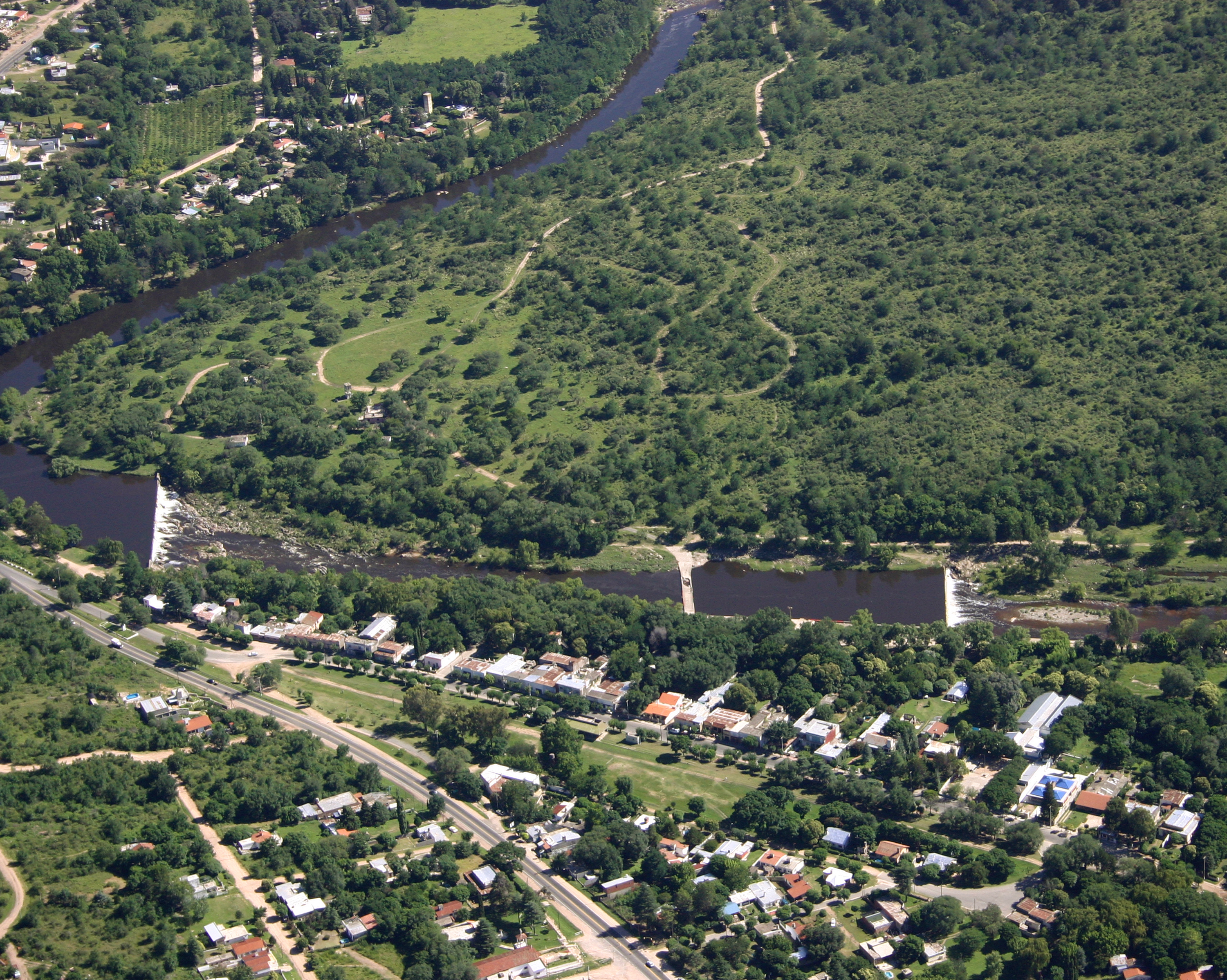 Bialet Massé, Provincia de Córdoba, Argentina